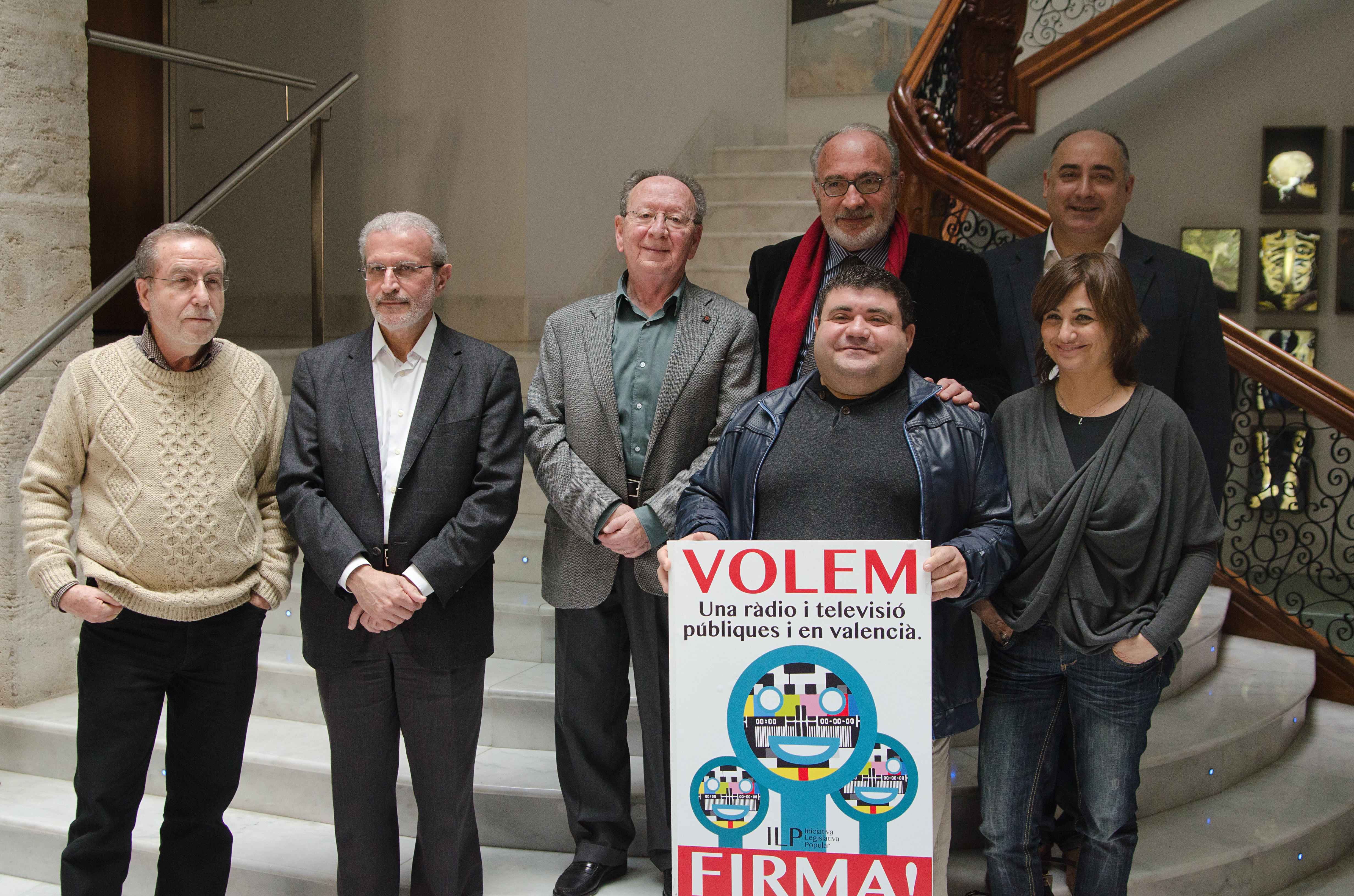 Presentació ILP Ràdio-Televisió en valencià